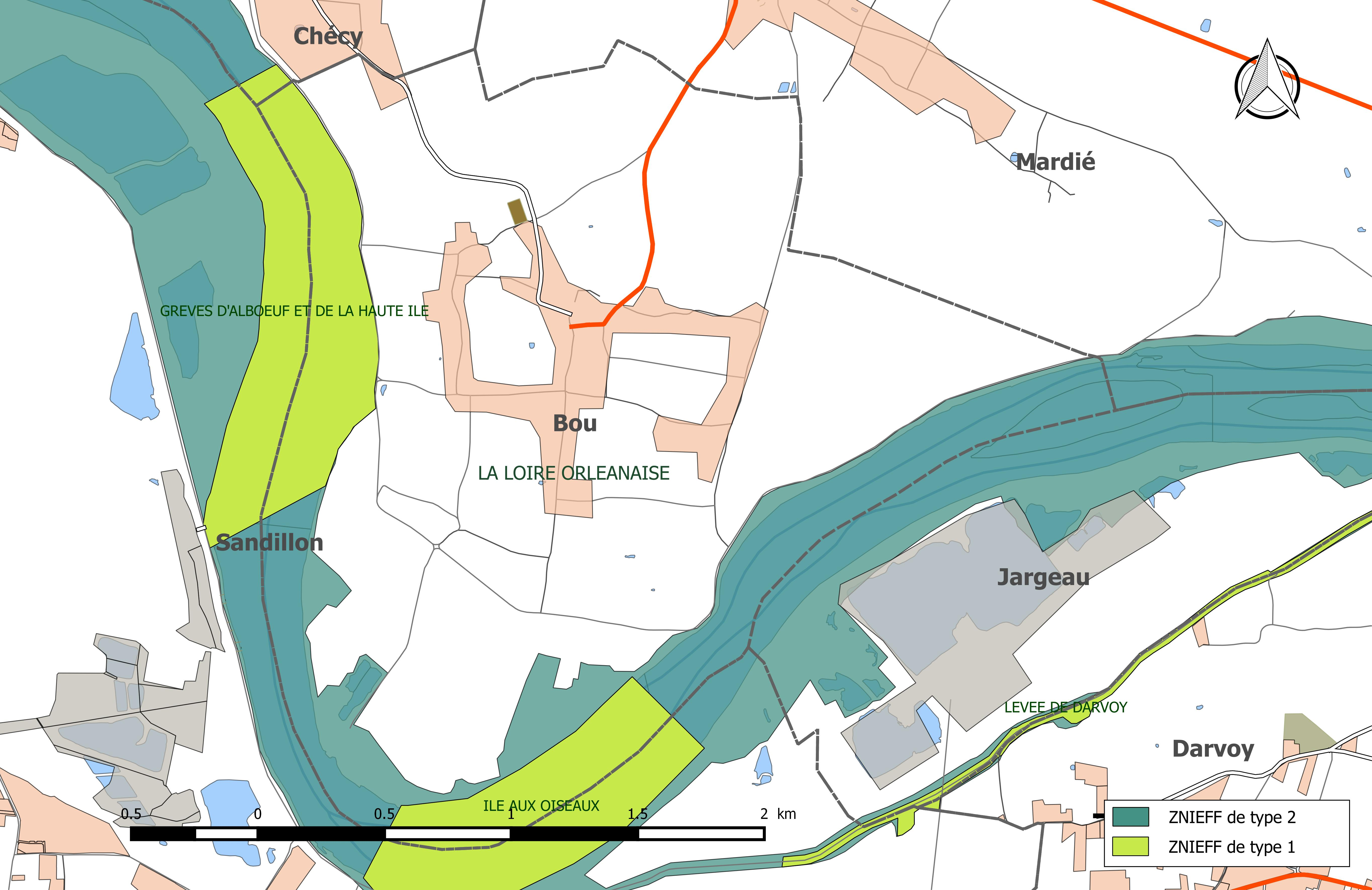 Carte des Zones naturelles d'intérêt écologique faunistique et Floristique (ZNIEFF) de la commune de Bou.